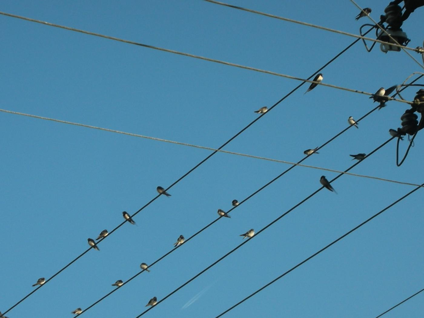 Hirundo rustica Schwalben sammeln sich im Herbst auf Stromleitungen